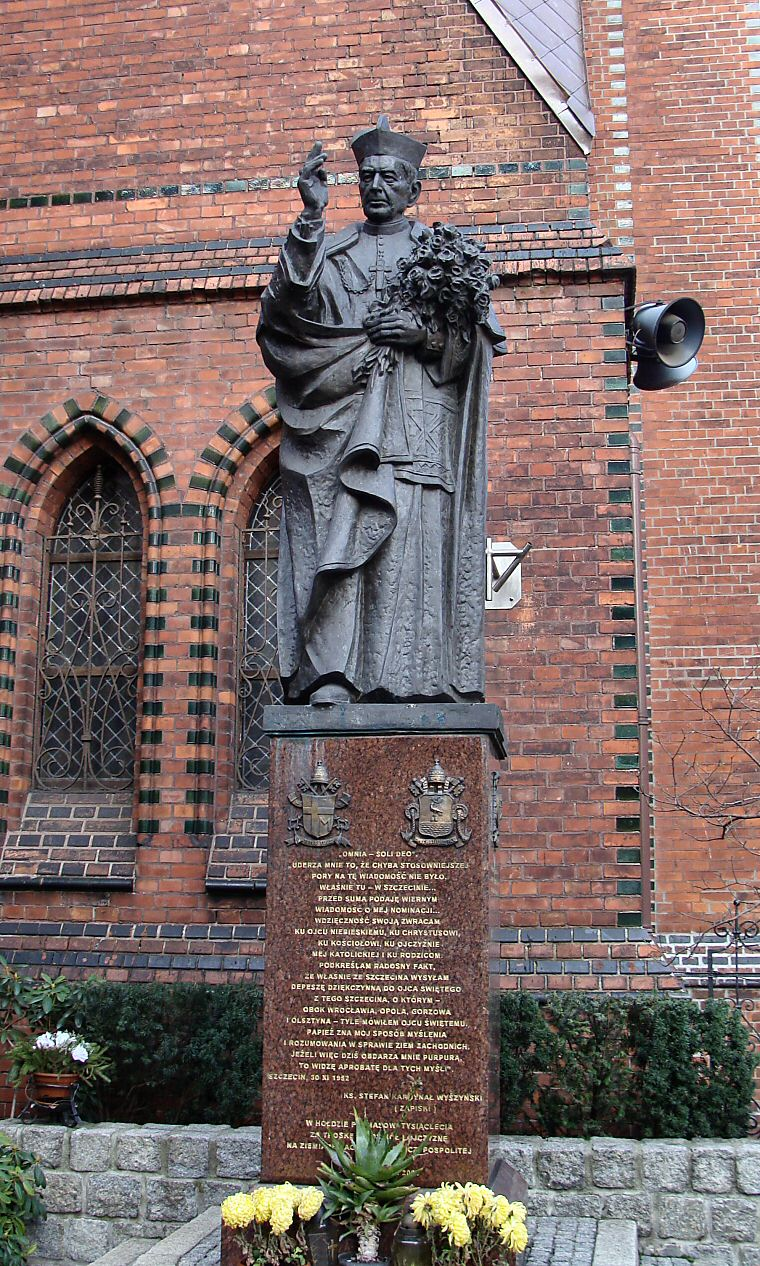 Bazylika św. Jana Chrzciciela w Szczecinie - pomnik prymasa Stefana Wyszyńskiego